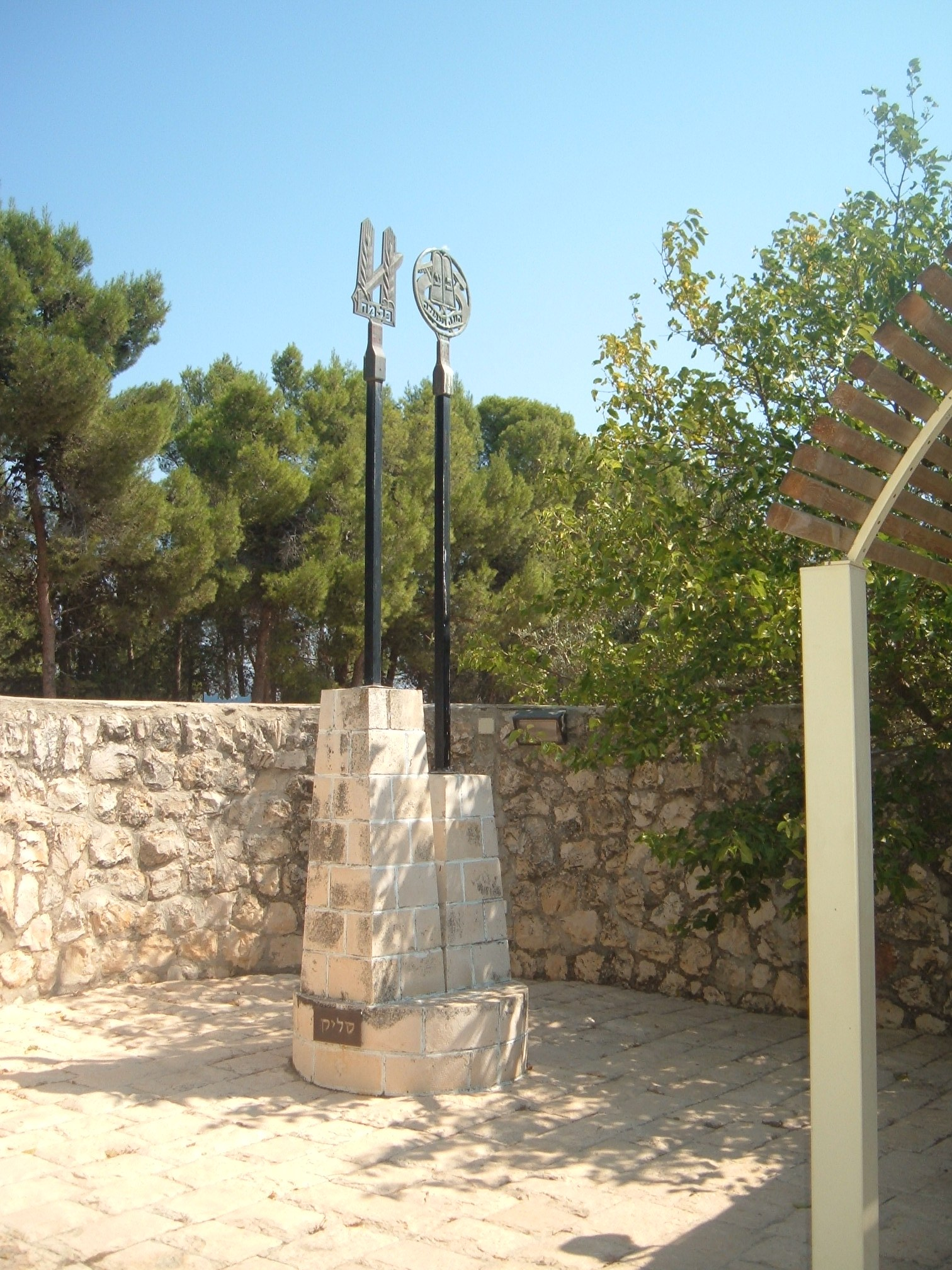 A memorial bearing palmach and bney Akiva insignia where an underground munitions storage used to be in birya fortress. אנדרטה הנושאת את סמלי הפלמ"ח ובני עקיבא נמצאת היכן שהיה הסליק במצודת ביריה